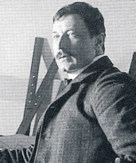 Arkitekt Ragnar Östberg på sitt kontor ca 1920